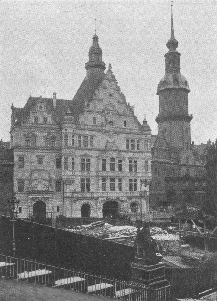 Das Georgentor des Residenzschlosses Dresden von der Brühlschen Terrasse gesehen, 1902.